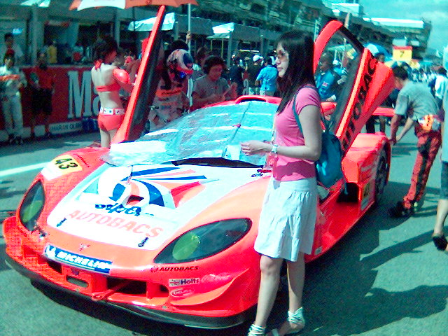 Super GT